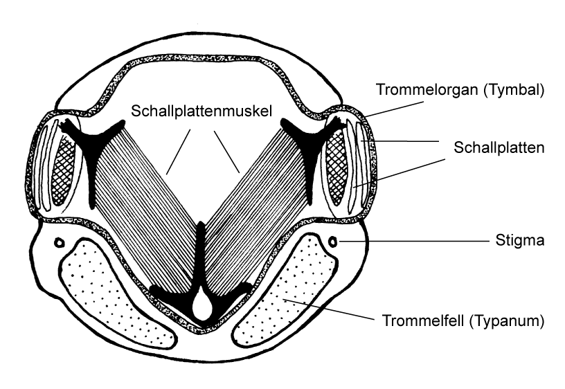 Bau des „Singapparates“ der Singzikaden – Tymbal- und Tympanalorgane einer männlichen Singzikade – Querschnitt durch den Hinterleib im Bereich des ersten Segmentes von vorn, Abdomenbasis von vorn, quer